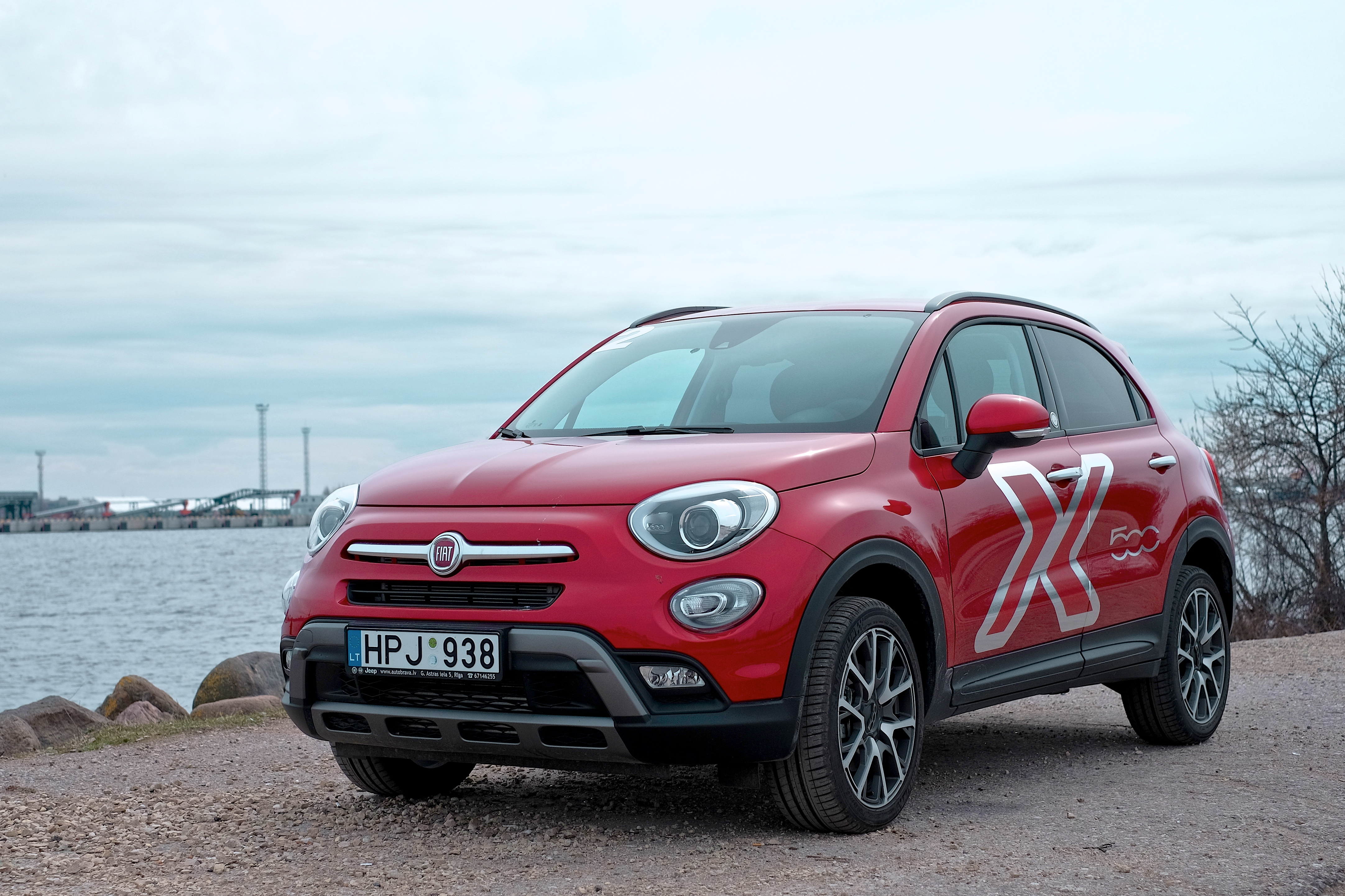 Fiat 500X